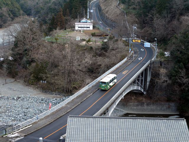 国道413号 両国橋（山梨県南都留郡道志村-神奈川県相模原市緑区）